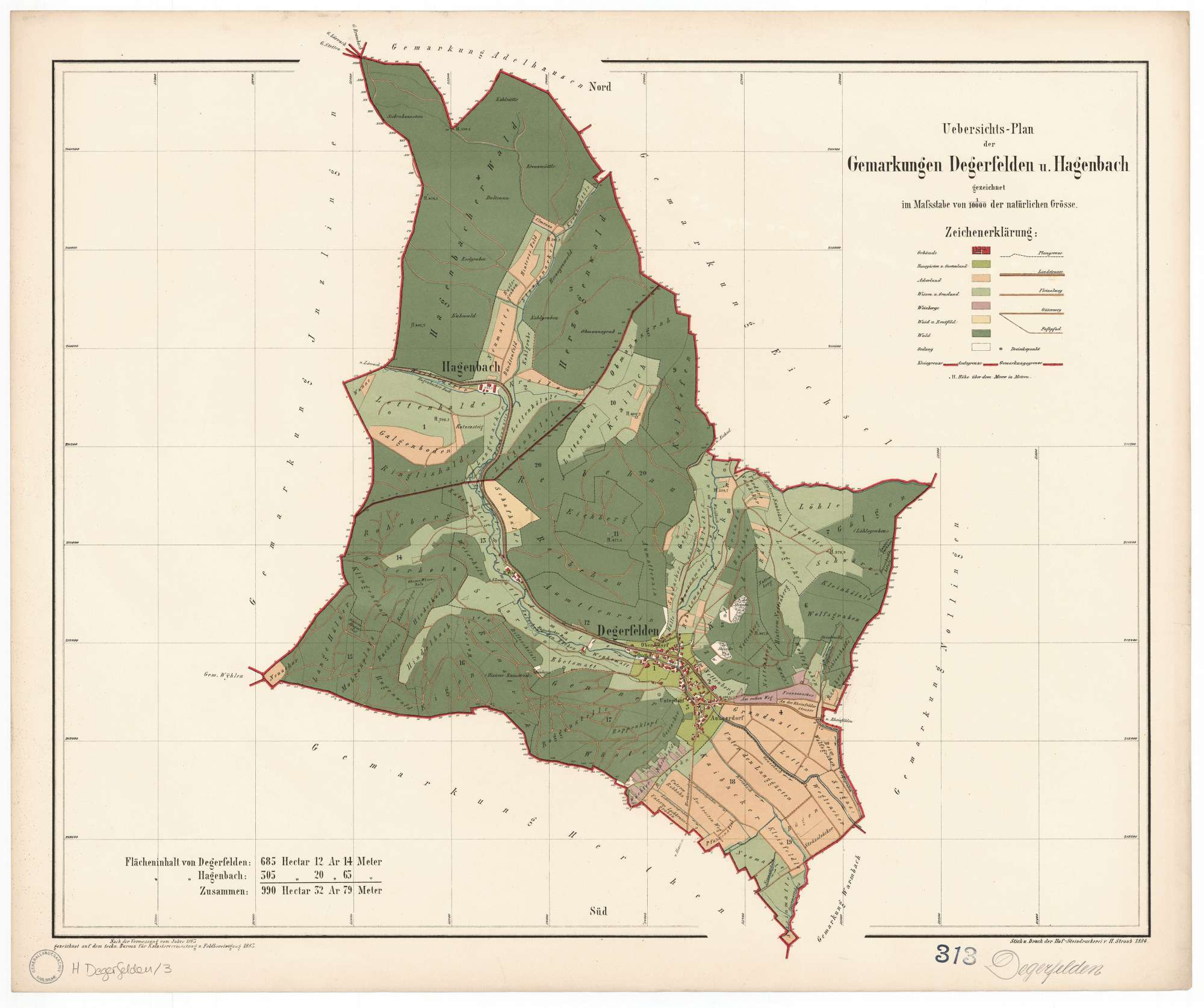 Karte von Degerfelden und Hagenbach, Vermessung und Zeichnung: 1883, Druck: 1884